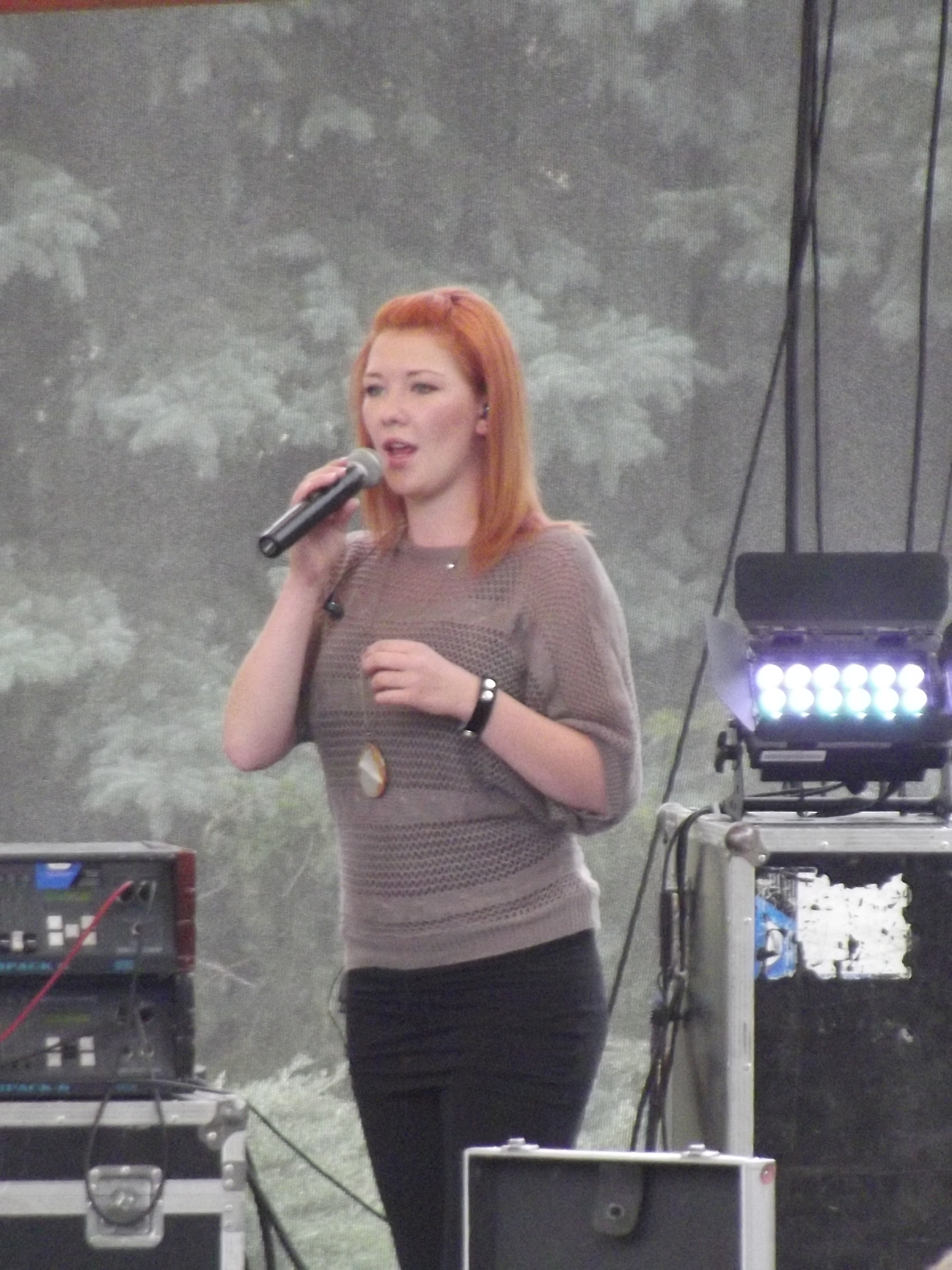 Debbi s kapelou na 858. zahájení lázeňské sezóny v Teplicích